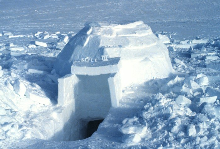 è un rifugio costruito con blocchi di neve, generalmente a forma di cupola. Era una costruzione tipica degli Inuit prima degli anni settanta, popolazione originaria dell'estremo nord del Canada.